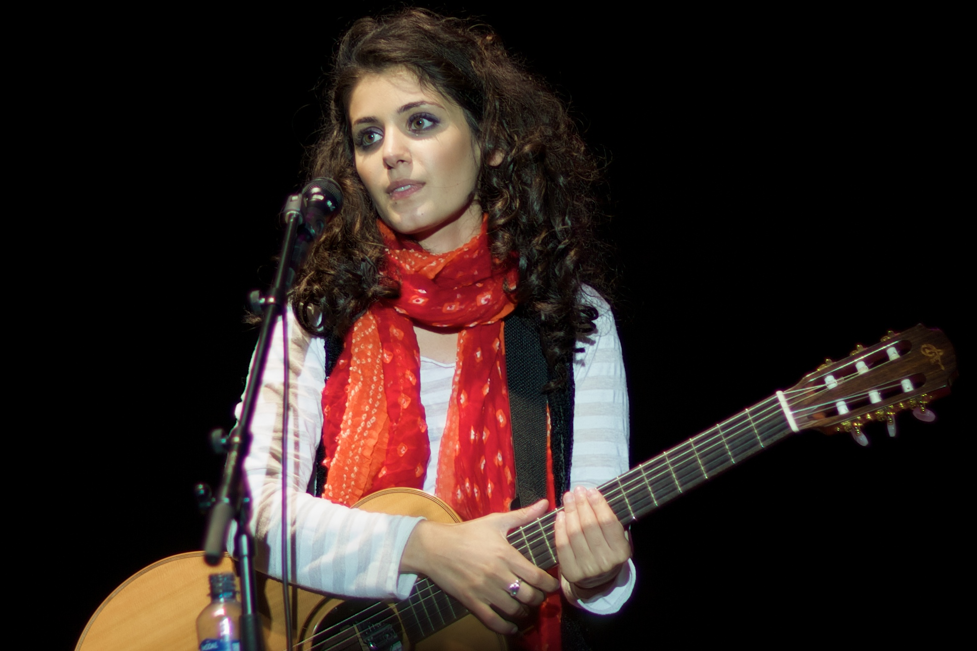 Katie Melua at Wrightegaarden, Norway.